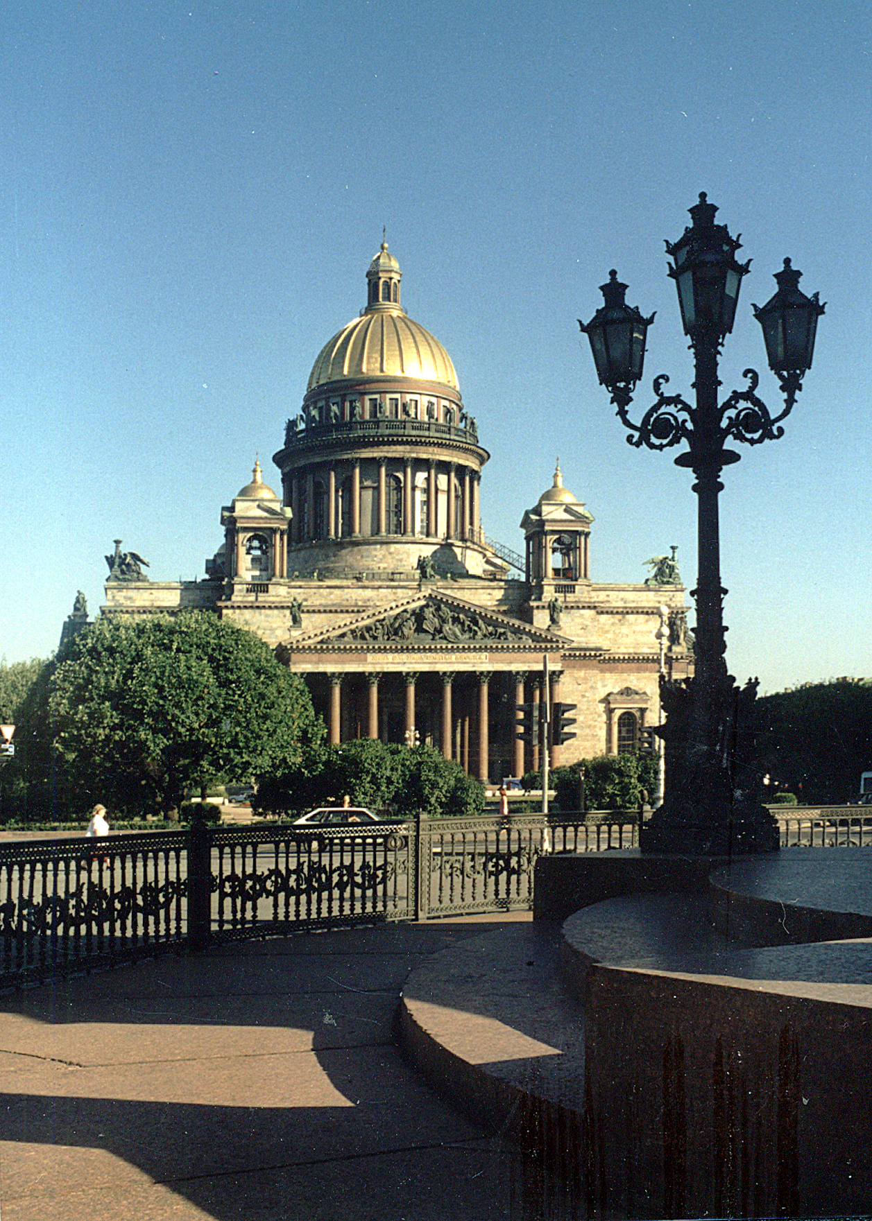 Собор Исаакия Далматского. Санкт-Петербург